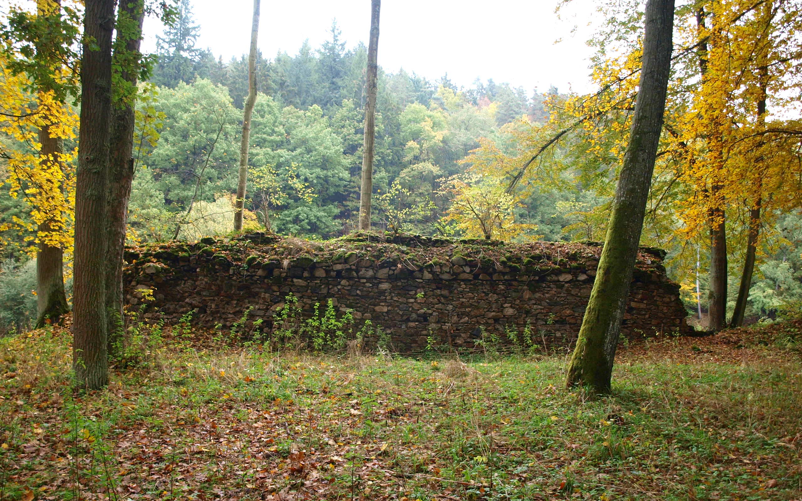 Příběnice, zbytky dolního opevnění